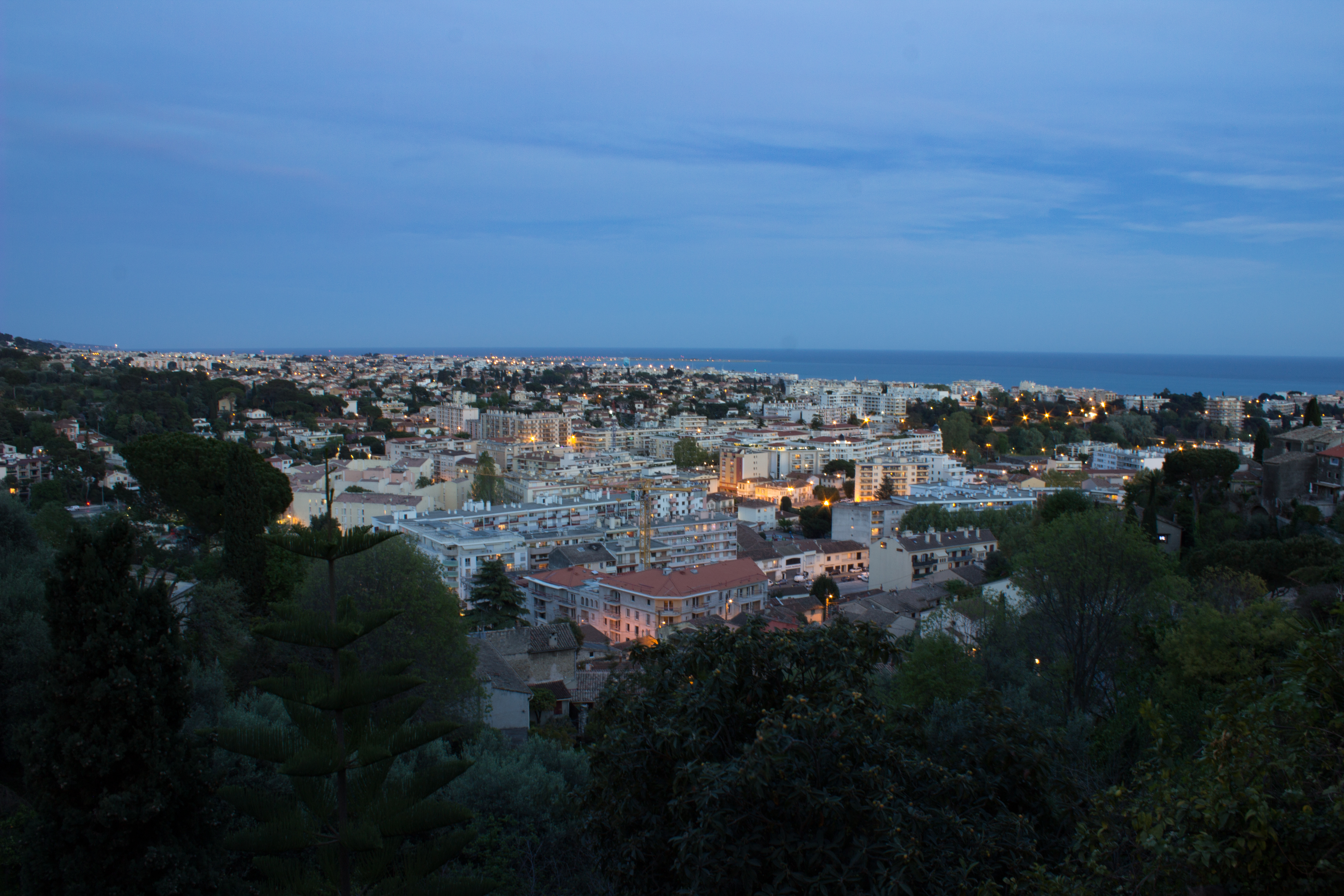 Cagnes-Sur-Mer depuis le Haut de Cagnes, un soir d'avril